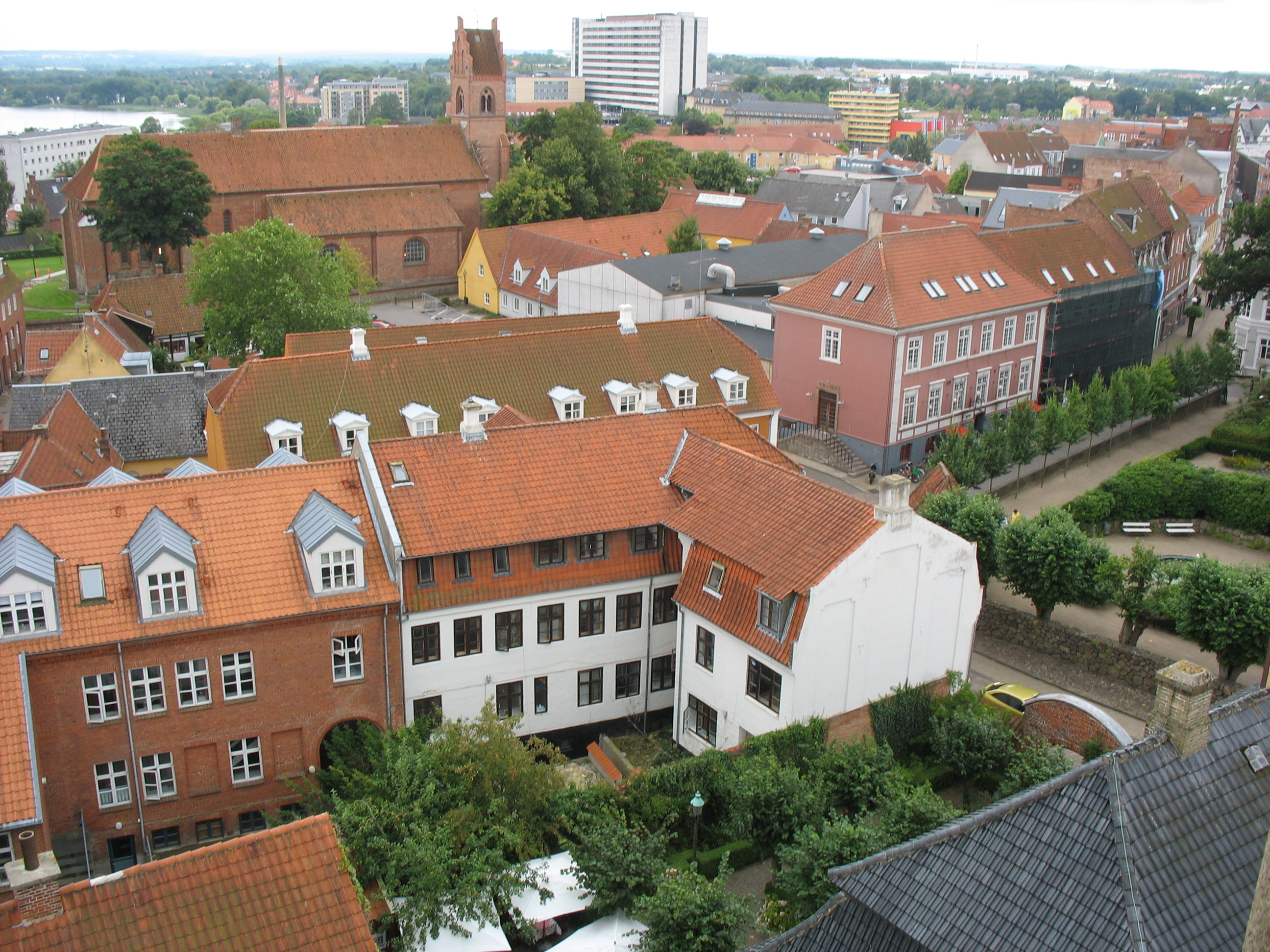 Historické centrum Viborgu v Dánsku